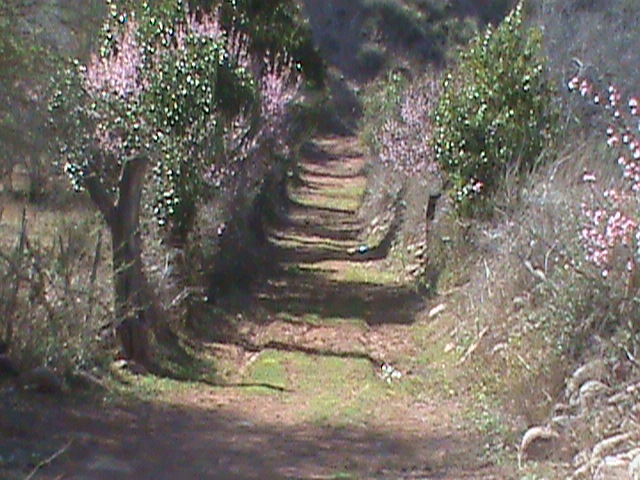 Los callejones de Aicuña se abren entre finca y finca, senderos que acompañan la silueta del rio, montañas que enmarcan paisajes, buscando salidas hacia la única calle que atraviesa el pueblo. Se convierten en testigos del tránsito de pastores con sus rebaños de ovejas y cabras, pobladores a lomo de mulas y caballos que trasladan leñas desde el cerro a sus hogares. Son también atajos donde perduran las búsquedas, de amigos, de familiares, de seres amados, promoviendo el encuentro y también los desencuentros.